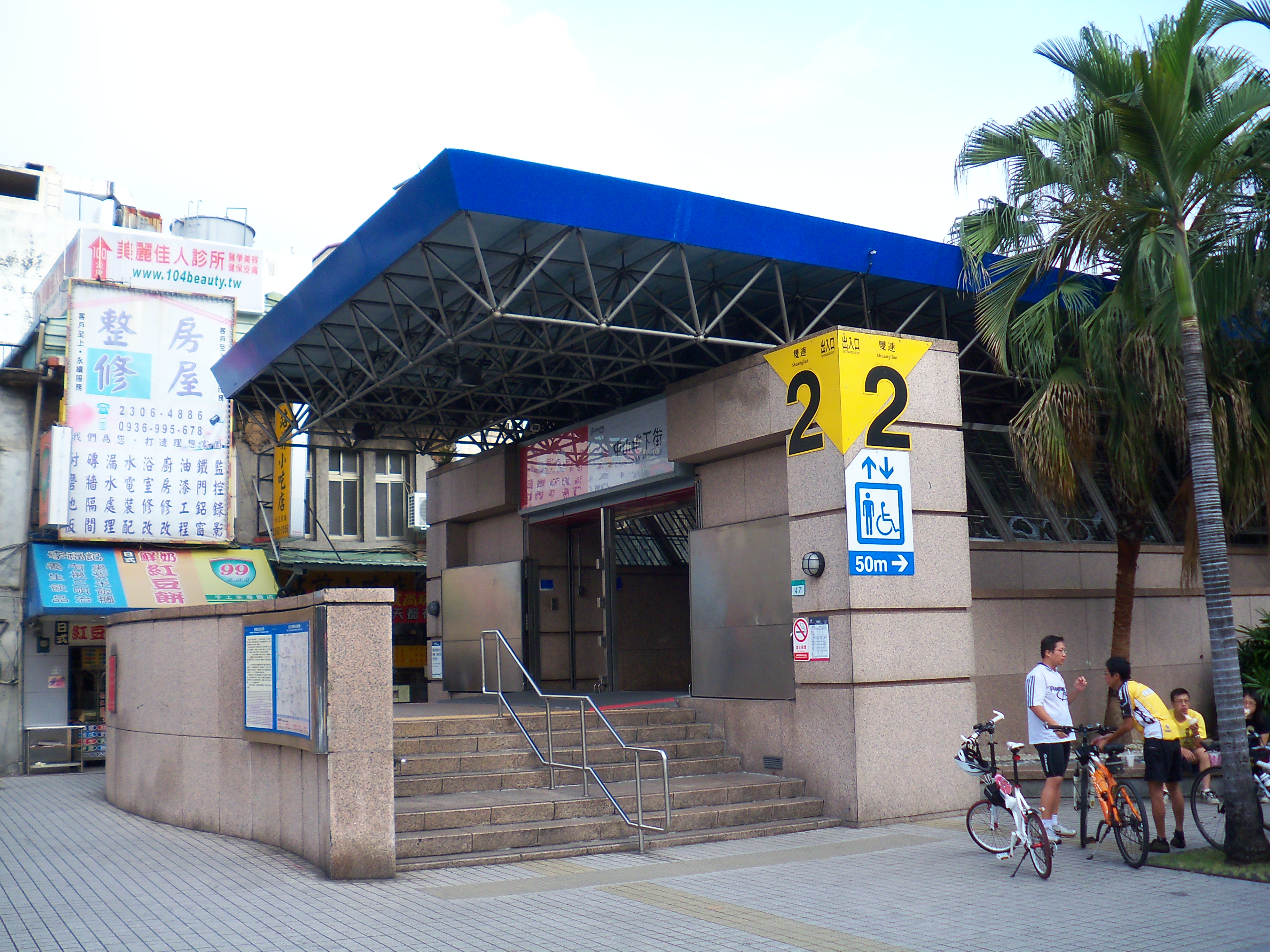 台北捷運淡水線双連駅2号出口。